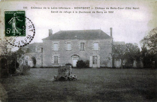 Châteaux de la Loire-Inférieure : Château de Belle-Cour (côté Nord) à Montbert. Servit de refuge à la Duchesse de Berry en 1832.